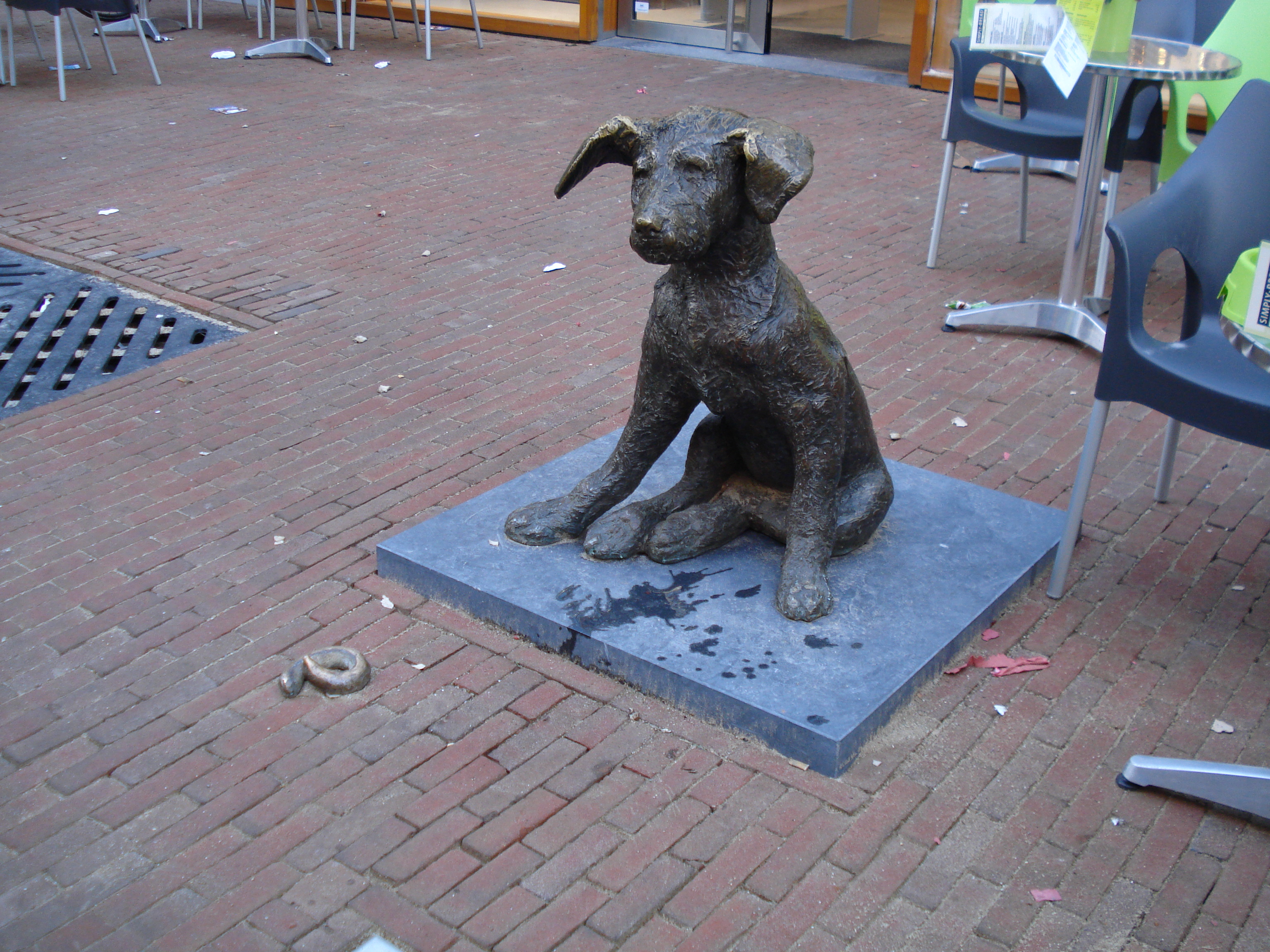 sculpture Fikkie (1963) by Joeki Simak (Boedapest, 1925) in Rotterdam/The Netherlands